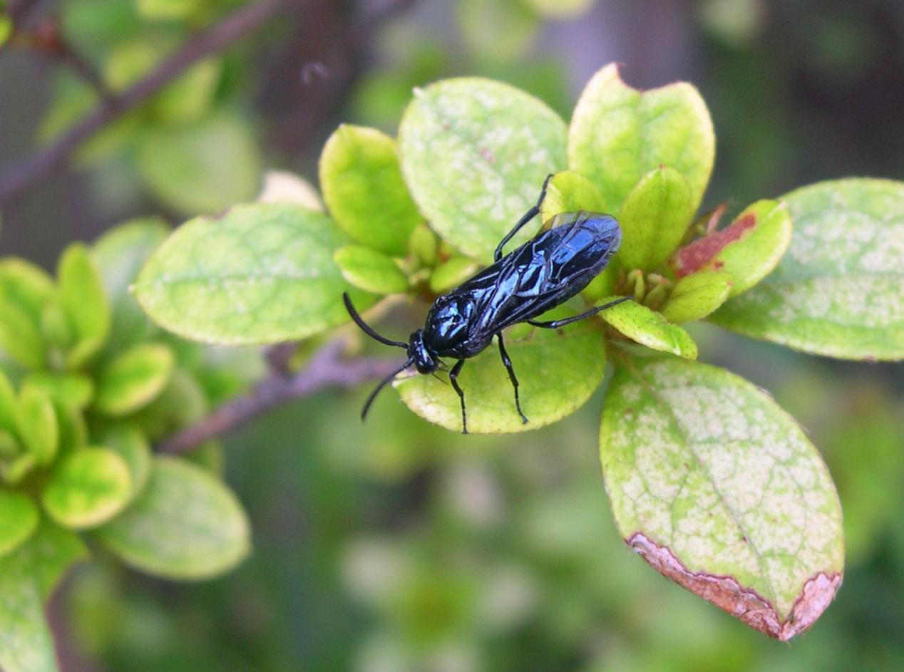 Description: Arge similis similis (Vollenhoven, 1860) (Order = Hymenoptera, Family = Argidae) Loc.: Yokohama, Kanagawa, Japan. Date: 2005-09-13 Photo: User:Takahashi ja: ツツジ類に来たルリチュウレンジ（ハチ目ハバチ亜目ミフシハバチ科）神奈川県横浜市にて撮影